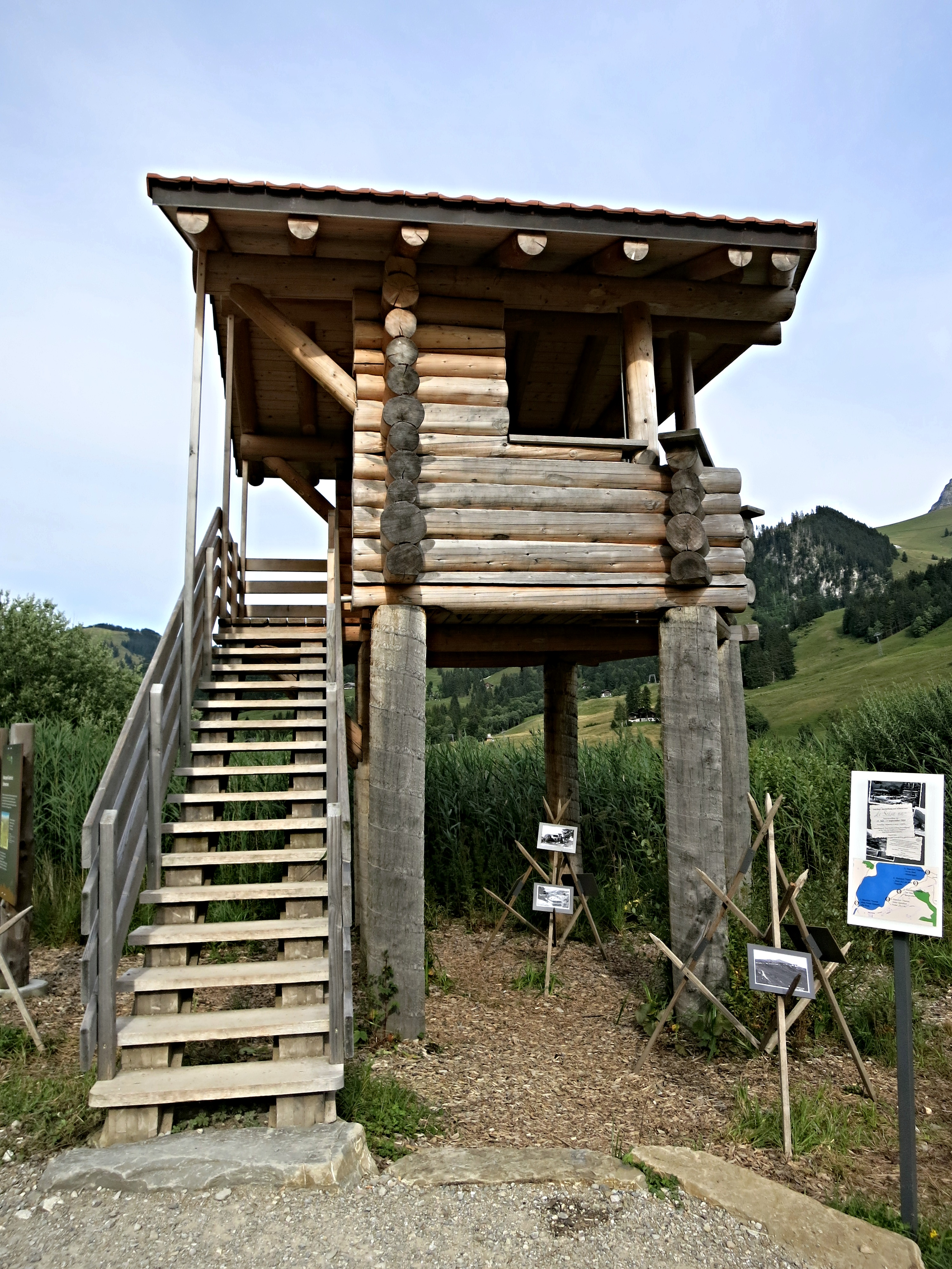 Schwarzseeturm